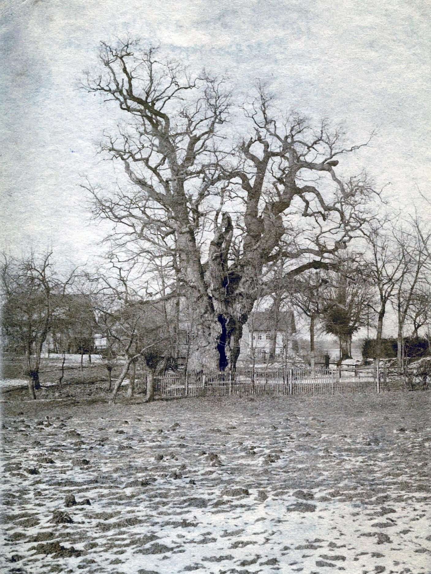 Die Eiche von Berteroda um 1900 - Winteraufnahme.